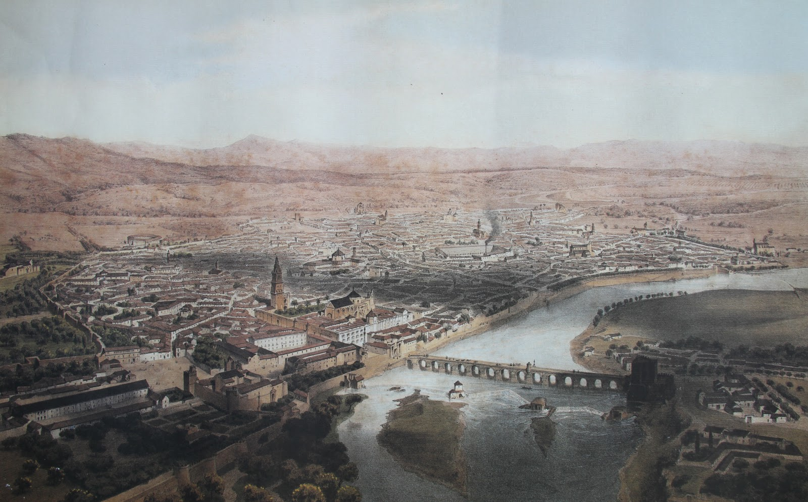 Córdoba en 1860. Alfred Guesdon.